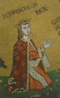 Fridericus III Rex Siciliae, mosaico del Duomo di Messina, Abside centrale